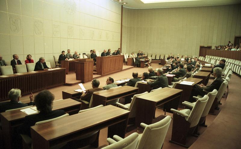 27. September 1990 Sondersitzung des Bundesrates Themen: - befristeter Verbleib amerikanischer, britischer und französischer Streitkräfte in Berlin - Ablösung besatzungsrechtlicher Regelungen in Berlin - Abzug sowjetischer Truppen aus und befristeter Aufenthalt auf dem Gebiet der Bundesrepublik Deutschland nach dem 3. Oktober